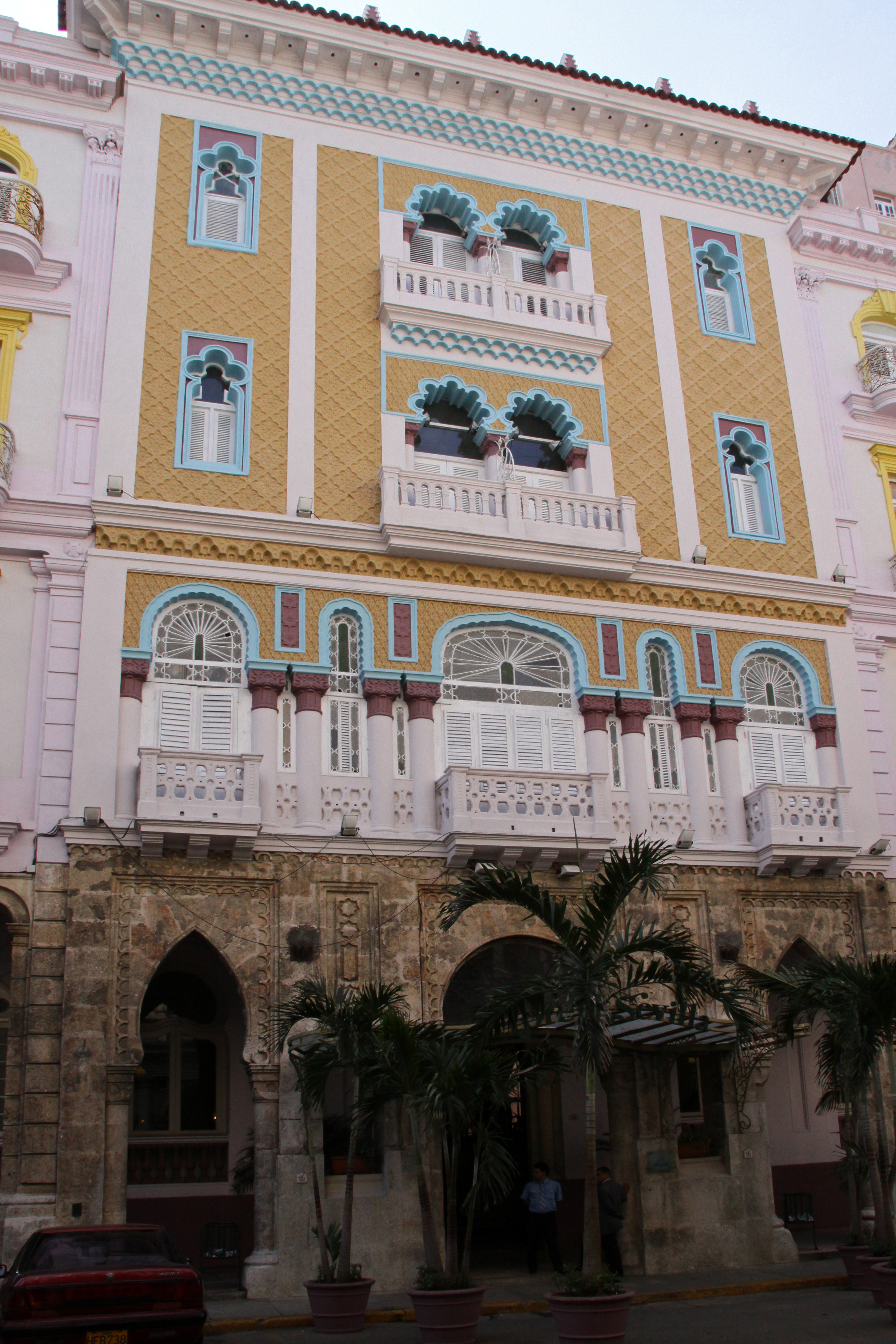 Hotel Sevilla 1